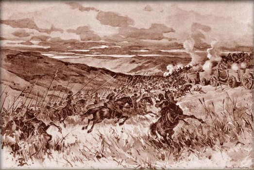 Adolf Liebscher (1857-1919) - Porážka železných pánů u Sudoměře dne 25. března roku 1420